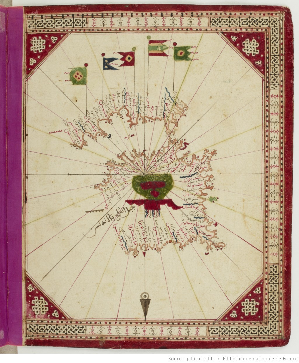 كتاب الطبلة